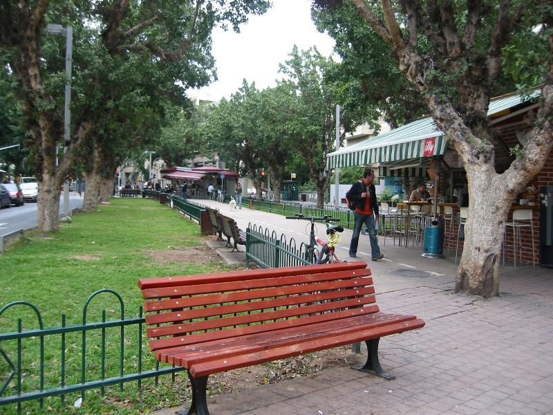 השדרות שופצו, הקיוסקים השתמרו, נעים להסתובב בשדרות רוטשילד בתל-אביב